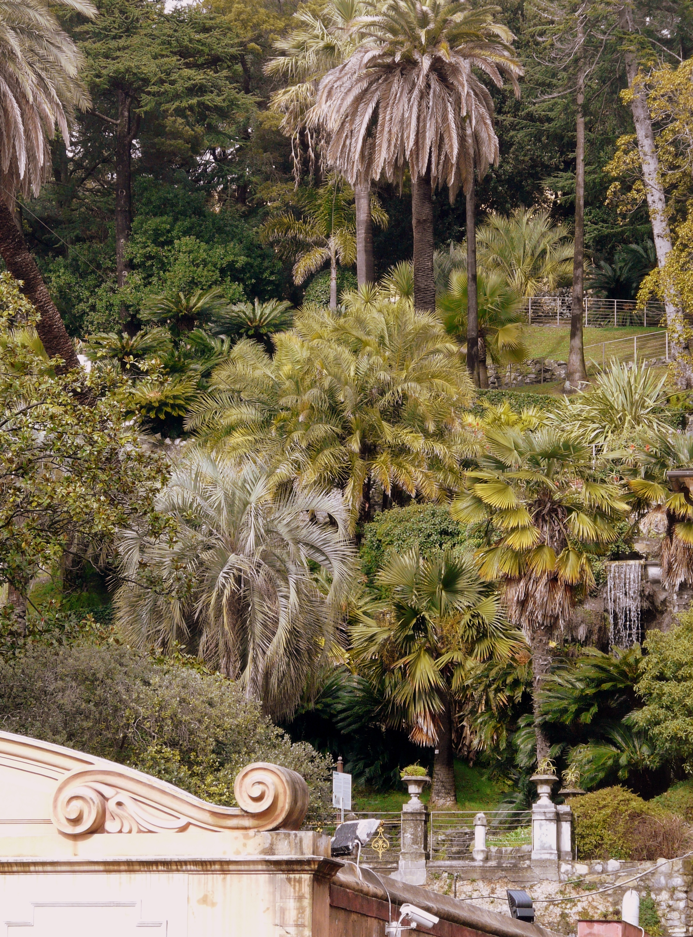 Particolare del giardino-parco di Villa Rocca, Chiavari, Liguria, Italia